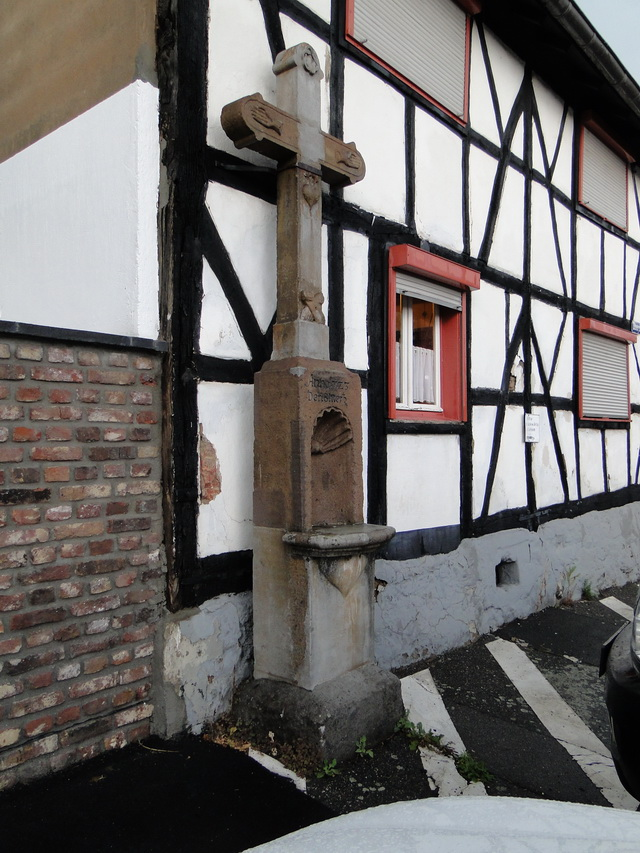 Das Wegekreuz wurde 1723 errichtet und befindet sich an der Ecke Oberdorfstraße (3) und Bergergasse Inschrift: Über der Muschelnische findet sich nur das Datum der Errichtung des Kreuzes: Anno 1723 Den 8. Mertz